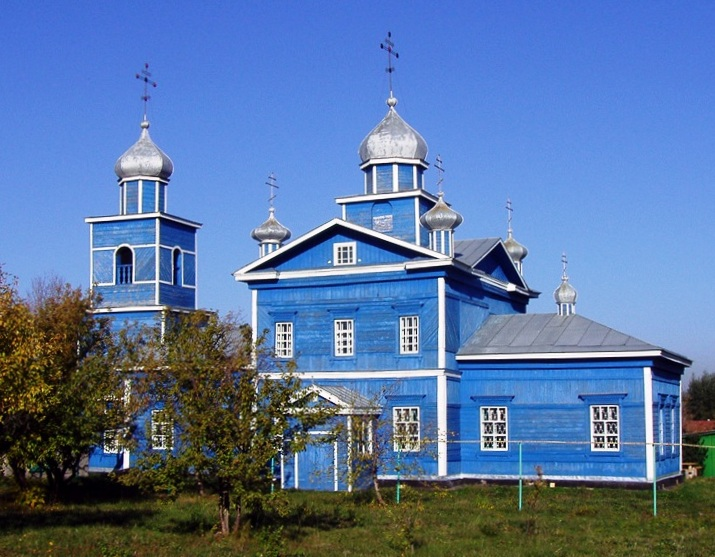 Церковь в селе Климово Ибресинского района Чувашии